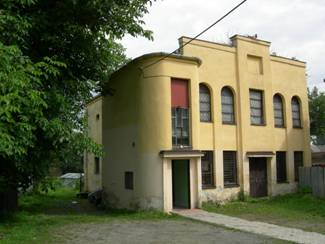 Synagóga